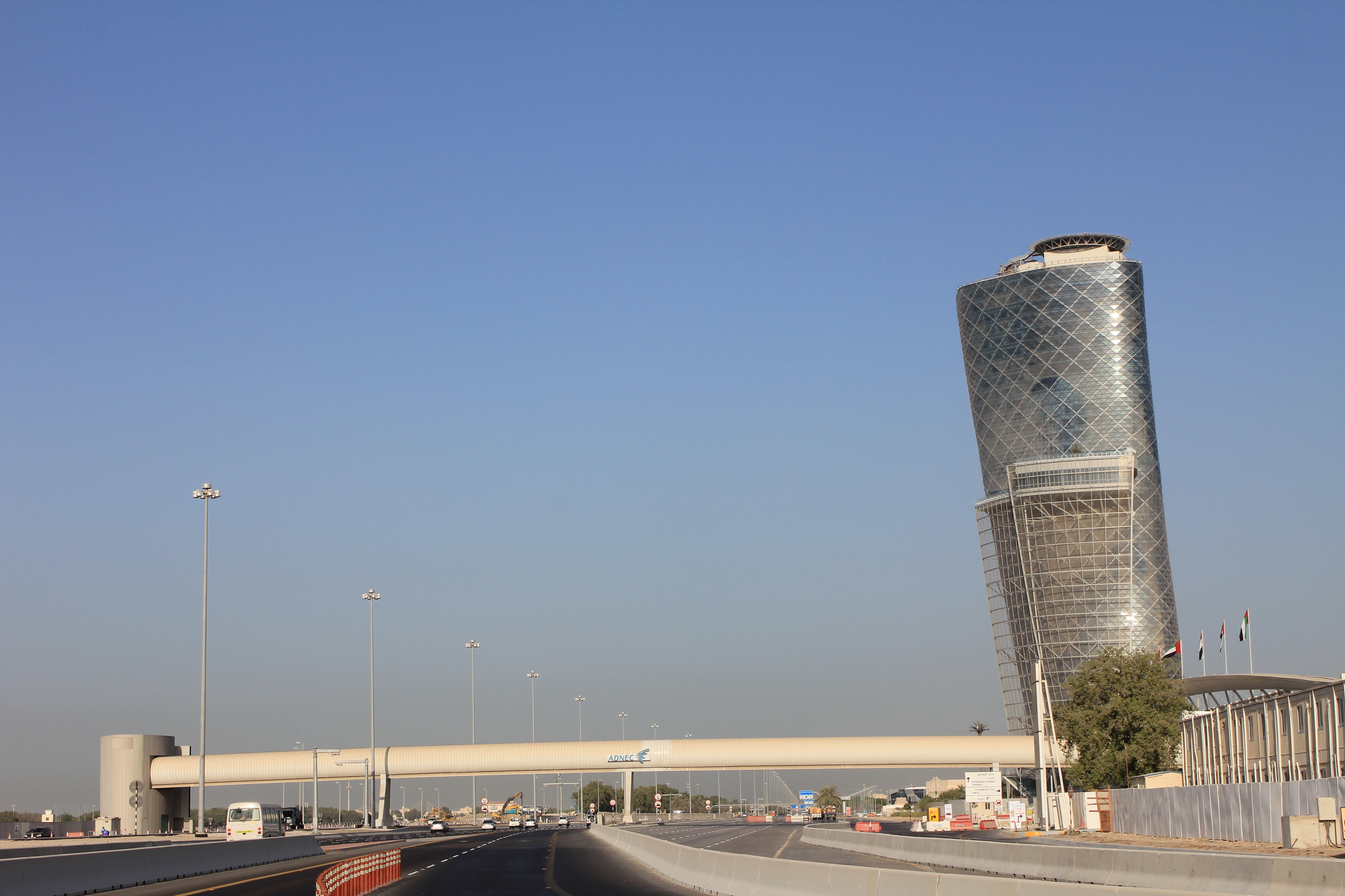 boot